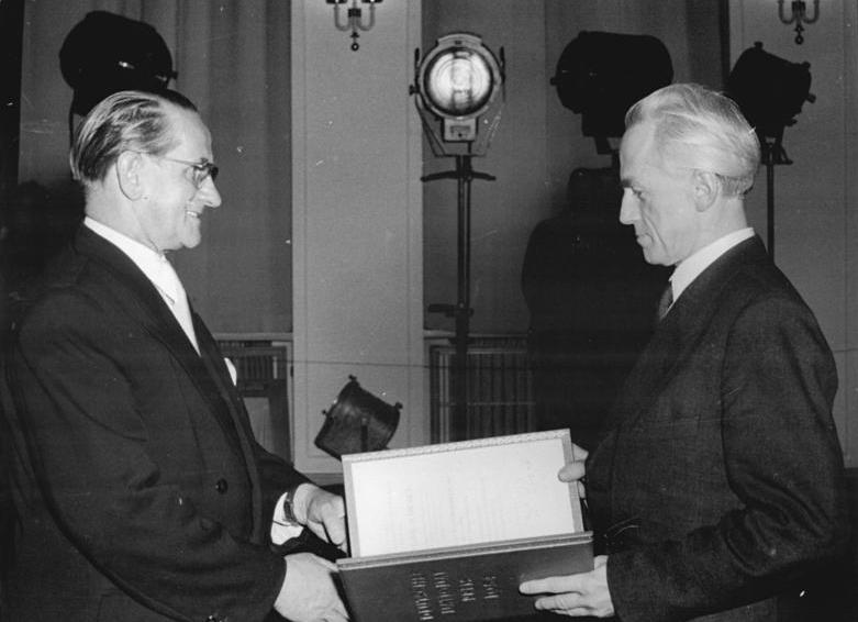 Berlin, Nationalpreis an Heinrich Drake Zentralbild Heilig 7.10.1954. Verleihung des Nationalpreises 1954 am 5. Jahrestag der Gründung der Deutschen Demokratischen Republik. In einem Festakt im Amtssitz des Präsidenten der Deutschen Demokratischen Republik in Berlin-Niederschönhausen zeichnete Präsident Wilhelm Pieck hervorragende Persönlichkeiten des kulturellen und wirtschaftlichen Lebens in der Deutschen Demokratischen Republik mit dem Nationalpreis 1954 aus. UBz: Staatssekretär [Max] Opitz überreicht im Namen des Präsidenten Wilhelm Pieck Professor Heinrich Drake den Nationalpreis 3. Klasse. Abgebildete Personen: Drake, Heinrich Prof.: Bildhauer, DDR Opitz, Max: Staatssekretär, Chef der Präsidialkanzlei, Vaterländischer Verdienstorden (VVO) in Gold 1965, DDR (GND 132482320)